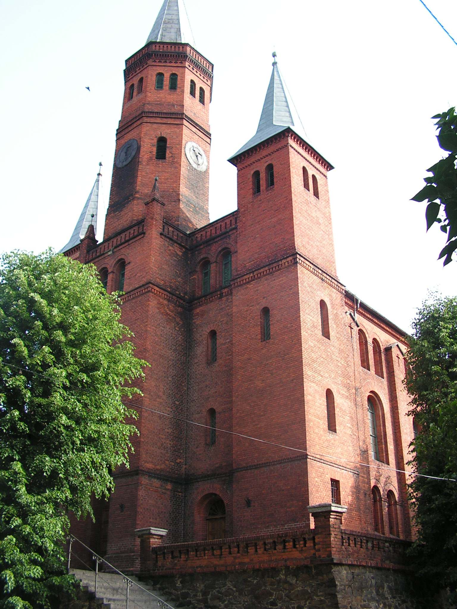 Kościół katolicki Narodzenia NMP zwany "czerwonym" w Piławie Dolnej, dawniej ewangelicki.